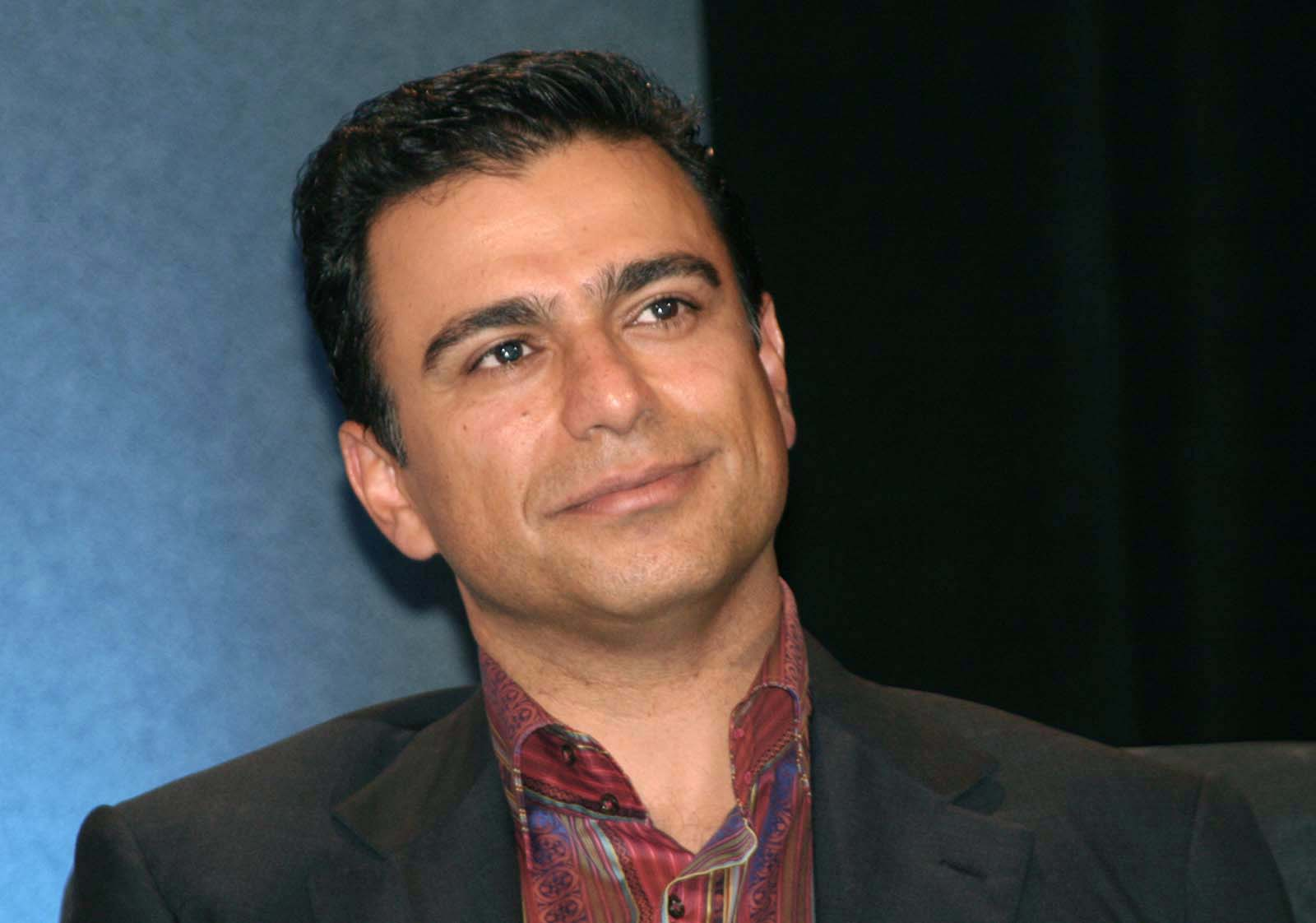 Omid Kordestani heads up Google's revenue generation efforts.